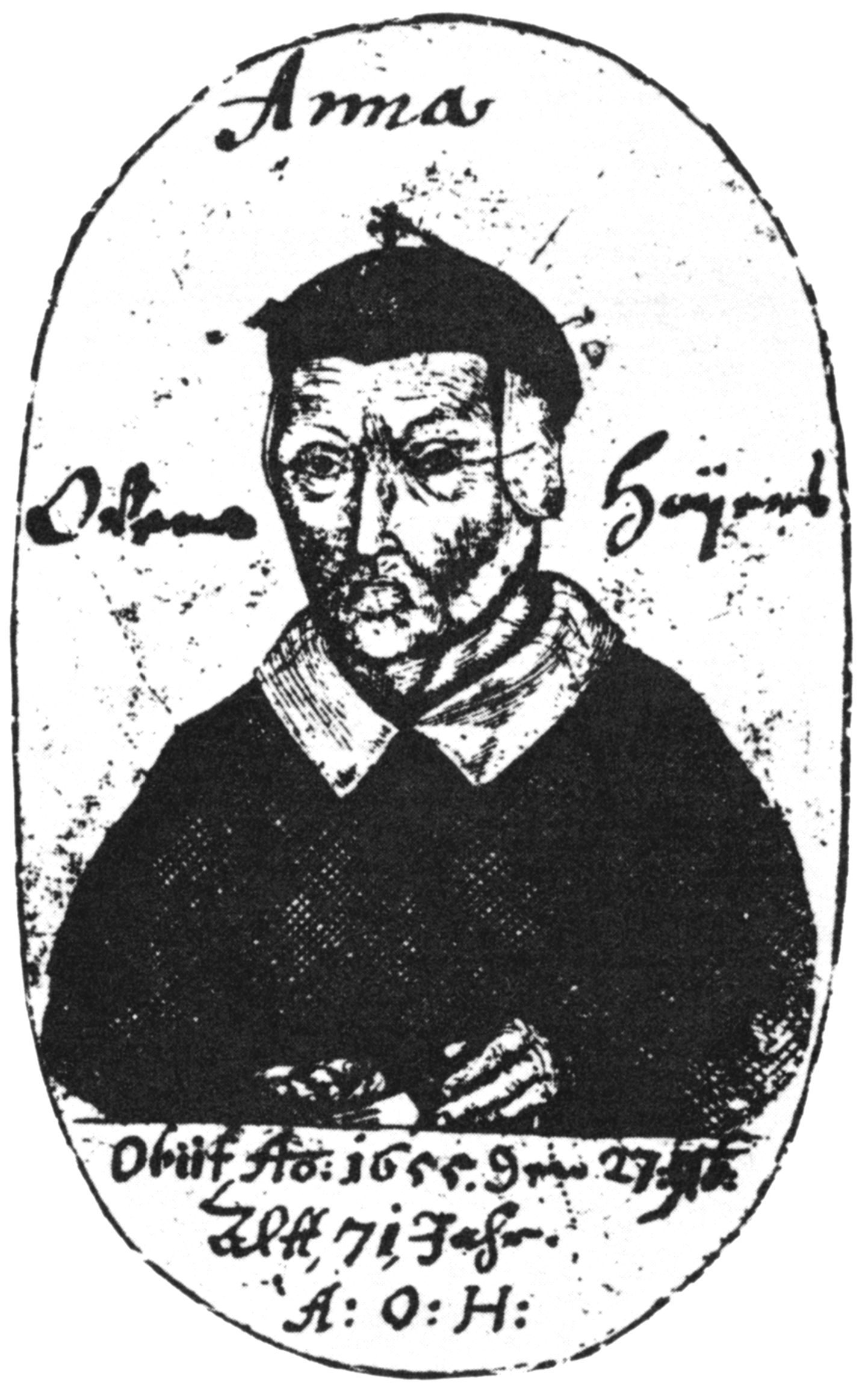 Bild vun Anna Ovena Hoyers, Kopperstich ut de Stockholmer Lederhandschrift, üm 1655